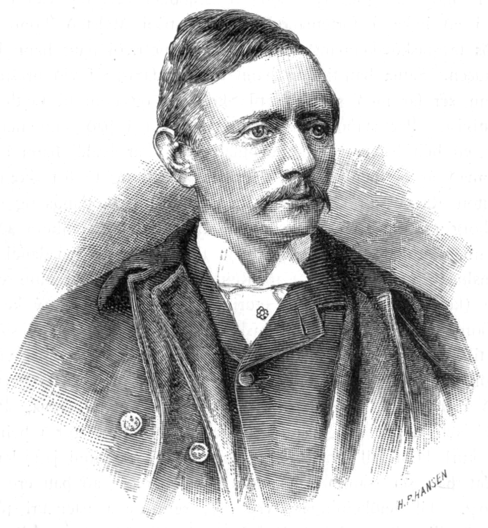 A portrait of Sveinbjörn Sveinbjörnsson (1847 - 1927).